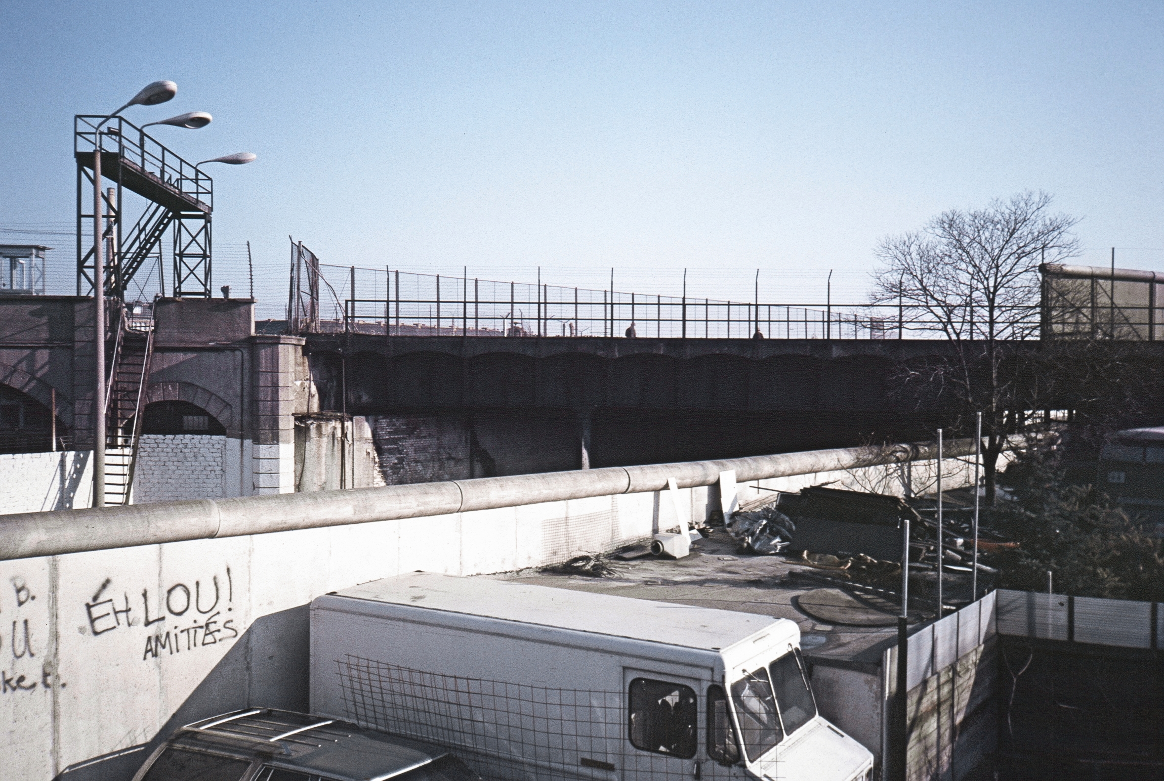 Berliner Mauer an der Kiefholzstraße mit Beschaubrücke auf der Ringbahntrasse